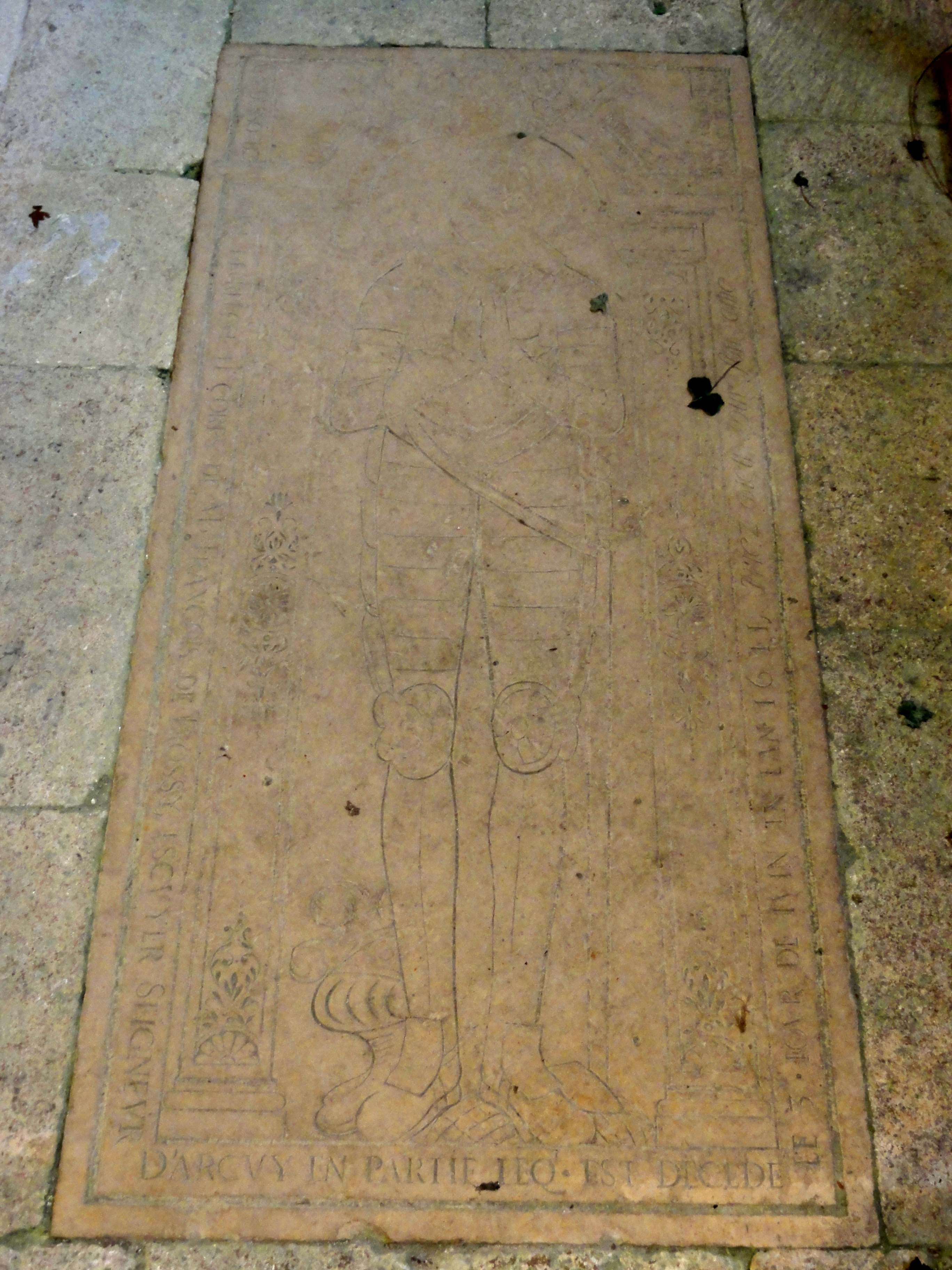 Dalle funéraire à effigie gravée de François de Trossy, seigneur d'Arcy en partie, mort le 5 juin 1641.